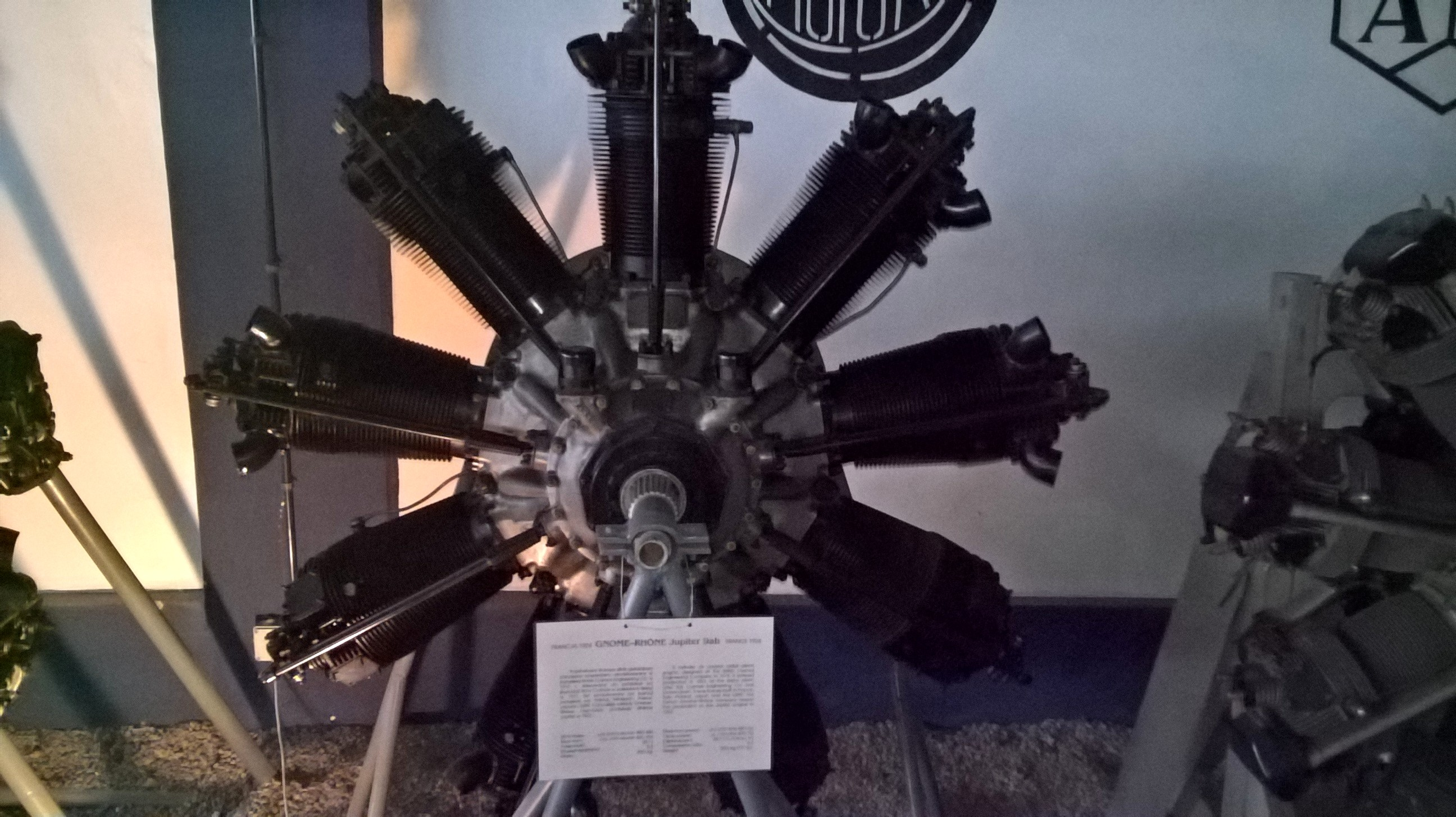 Francuski 9-cylindrowy silnik gwiazdowy Gnome-Rhône 9Ab Jupiter z 1924 r. ze zbiorów Muzeum Lotnictwa Polskiego w Krakowie.